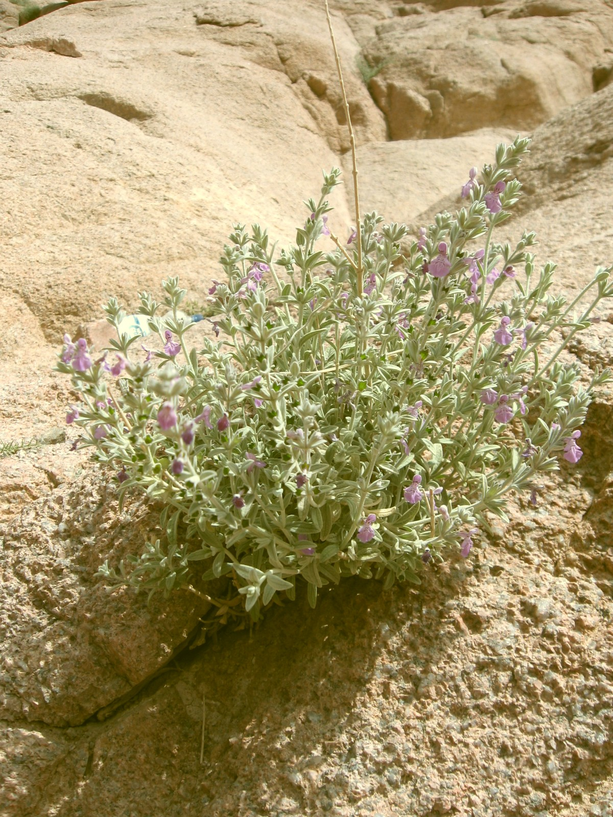 Stachys aegyptiaca Pers.